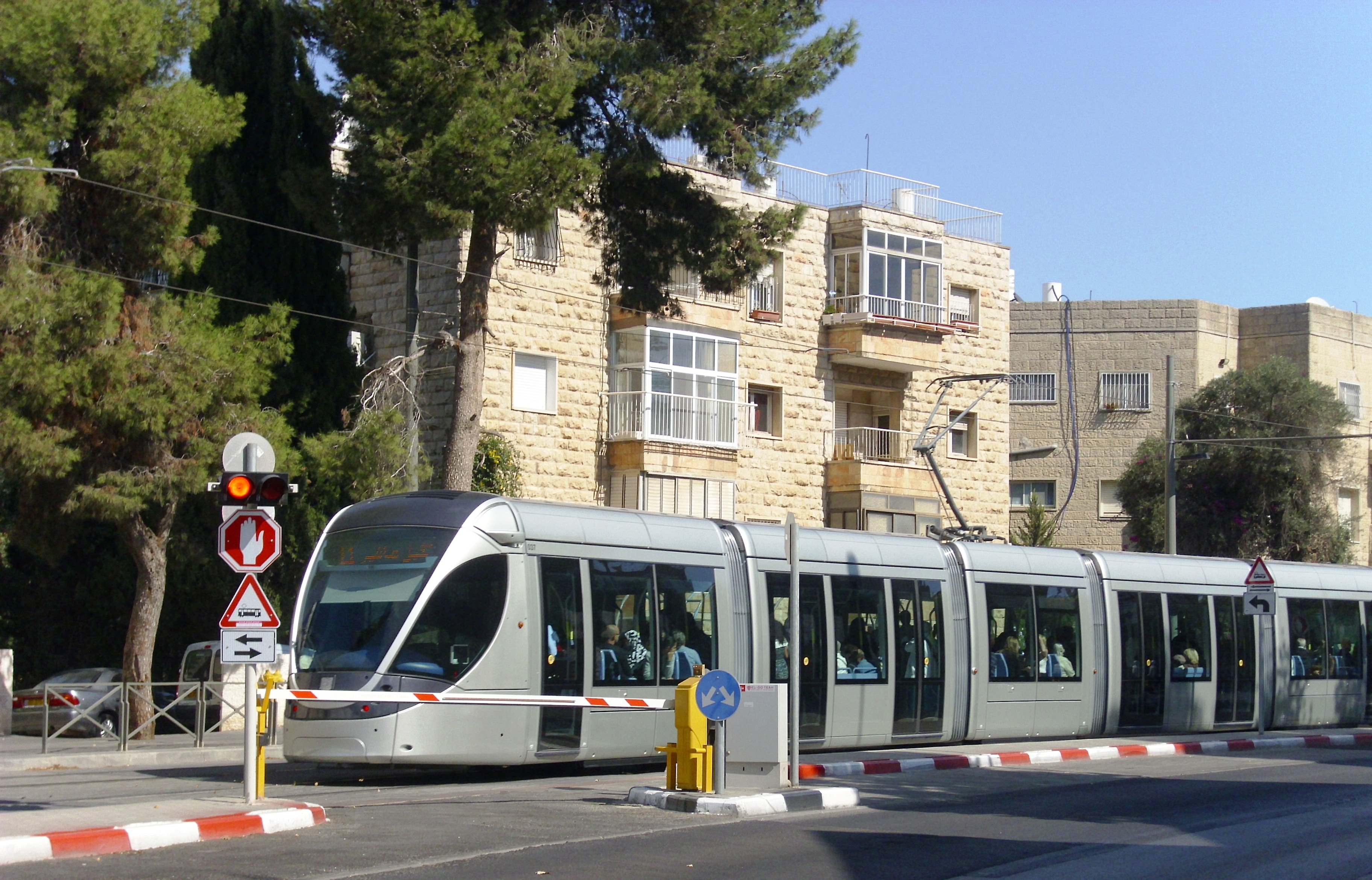 Grundstückszufahrt Blvd. Herzl mit Sc hranken